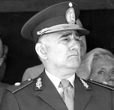 Retrato de Héctor L. Ríos Ereñú.